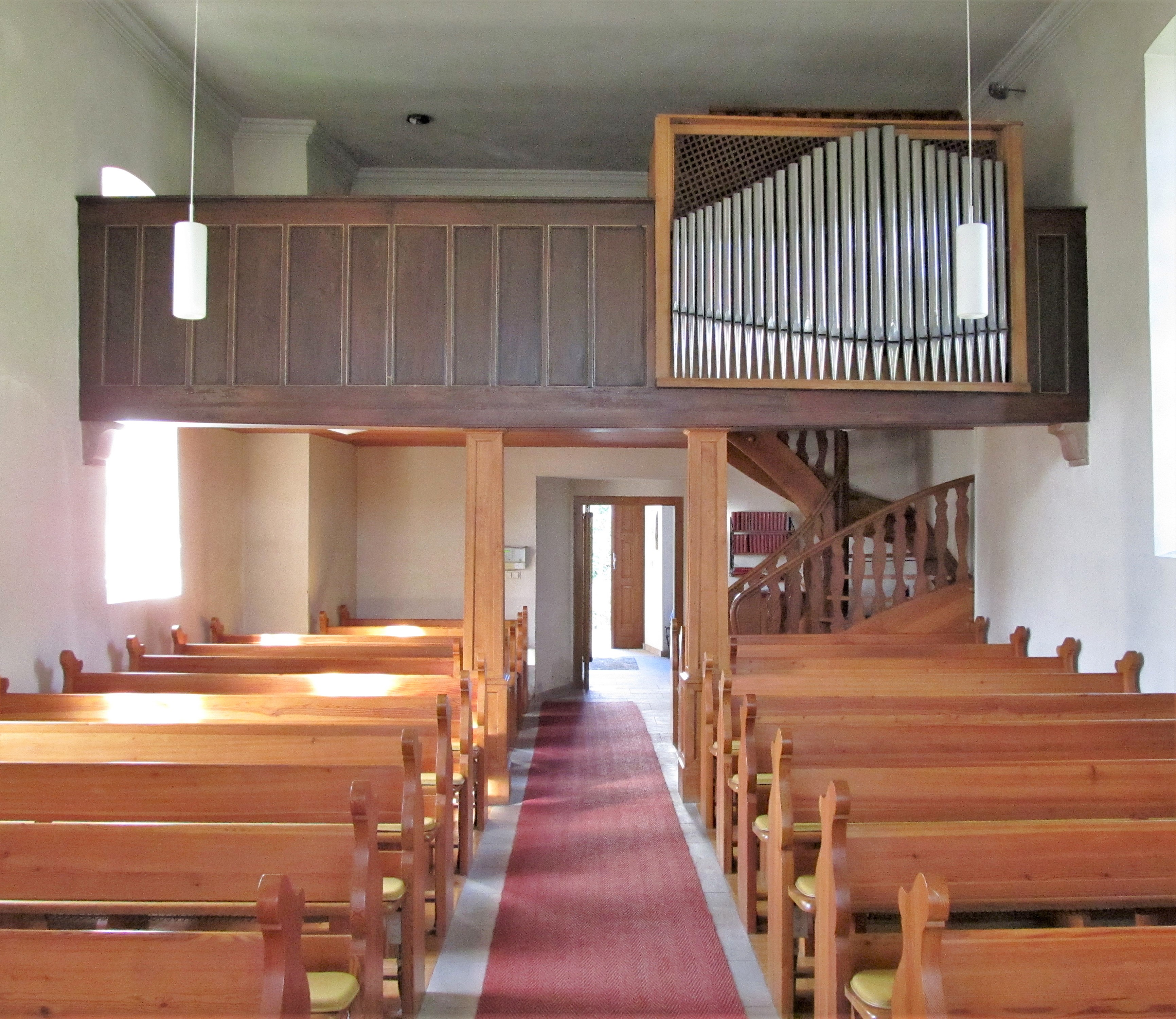 Blick vom Altar zur Empore und der Orgel der protestantischen Kirche in Walsheim, einem Ortsteil der Gemeinde Gersheim, Saarland